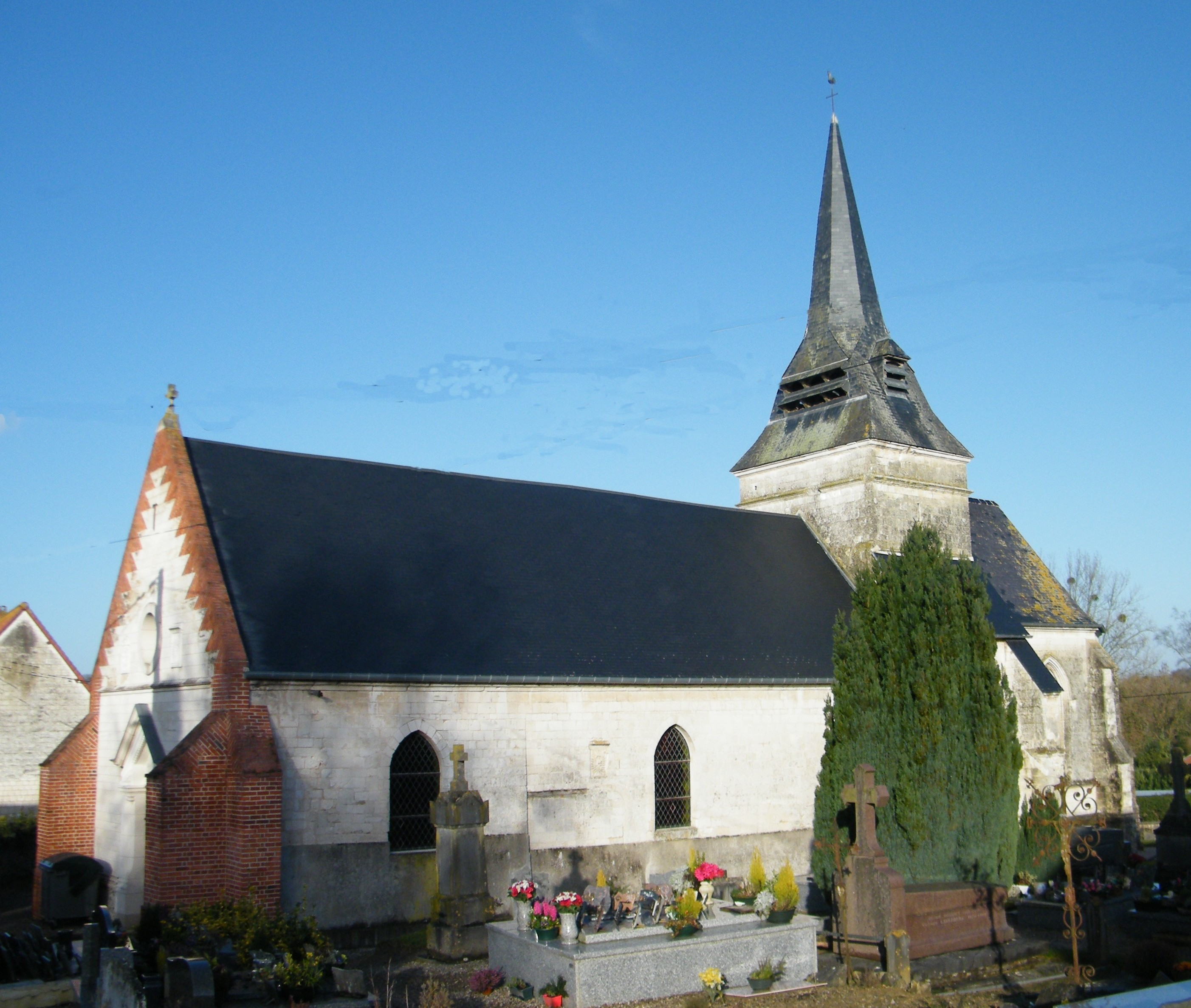 Saint-Léger à Ponches.